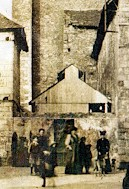 Le tripot situé à gauche de l'église Notre Dame de Brissarthe